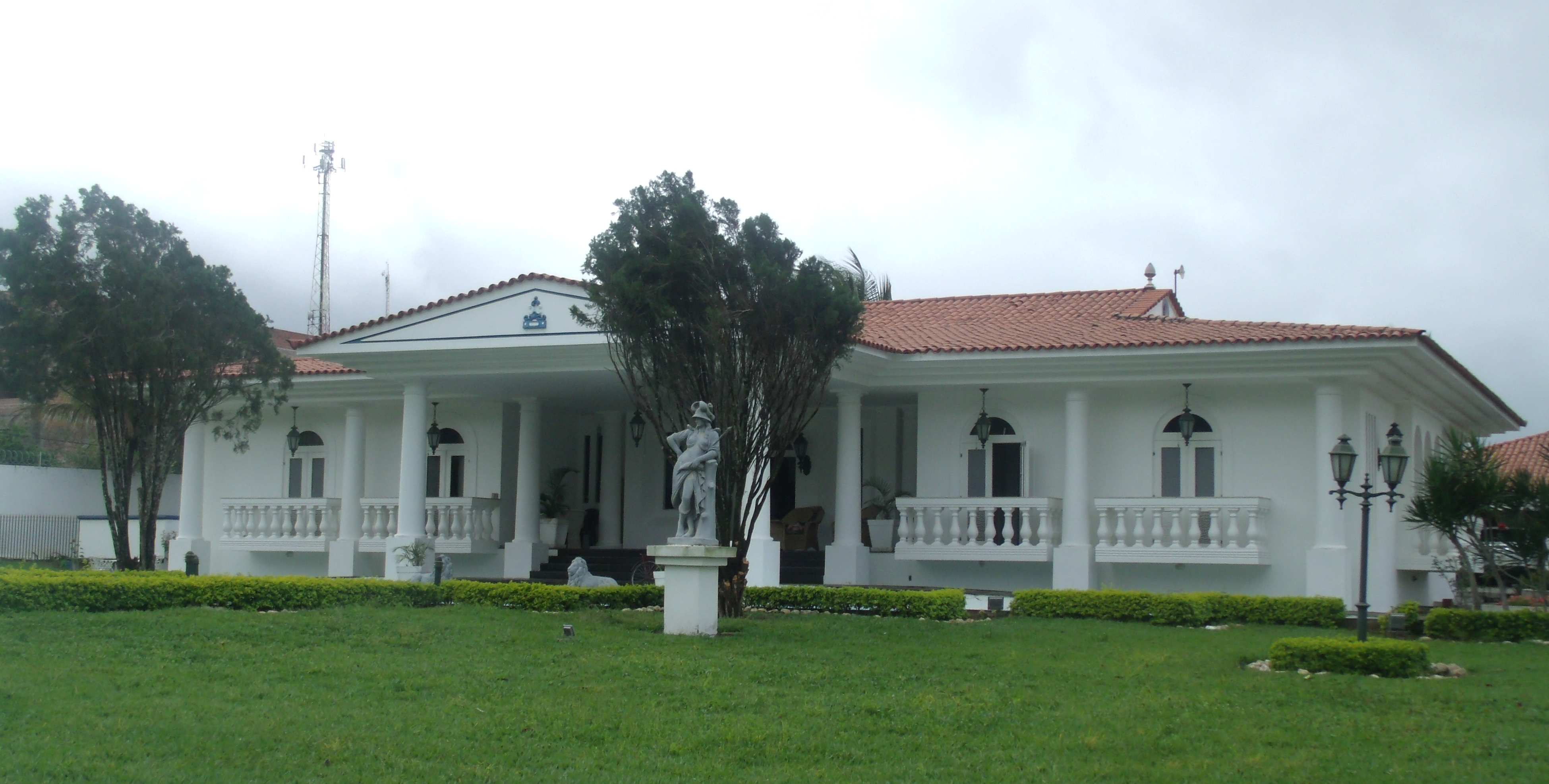 Palacete de Tianguá, uma monumental residência.